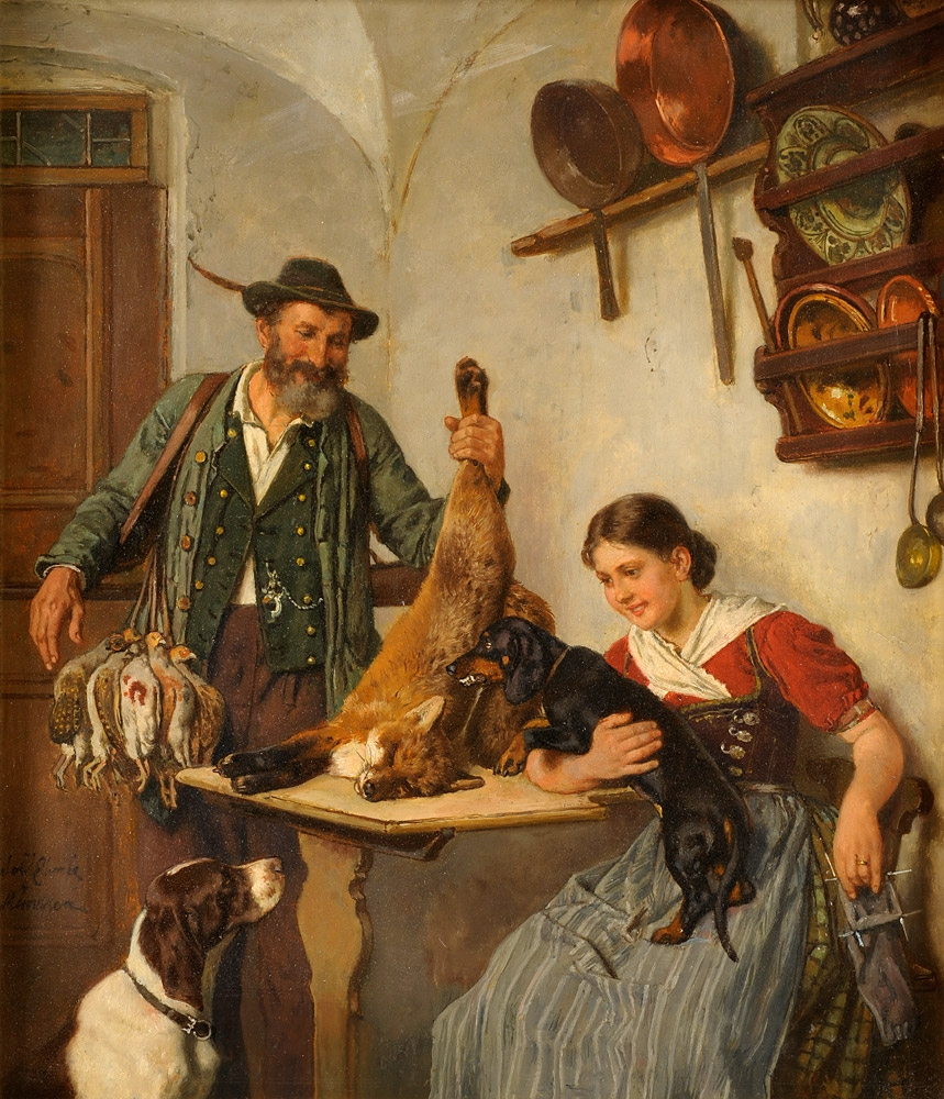 Eine erfolgreiche Jagd. Signiert. Öl auf Holz, 46 x 40 cm